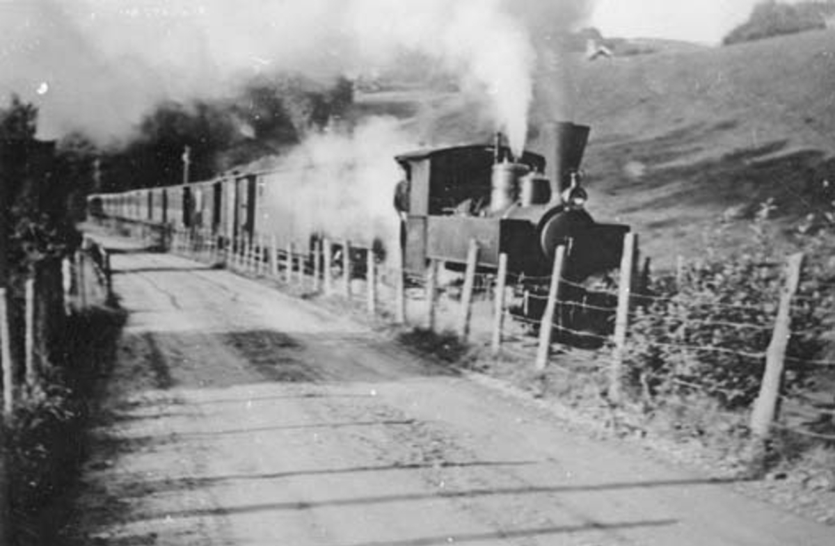 Damplokomotivene "Os" og "Ulven" foran siste persontog